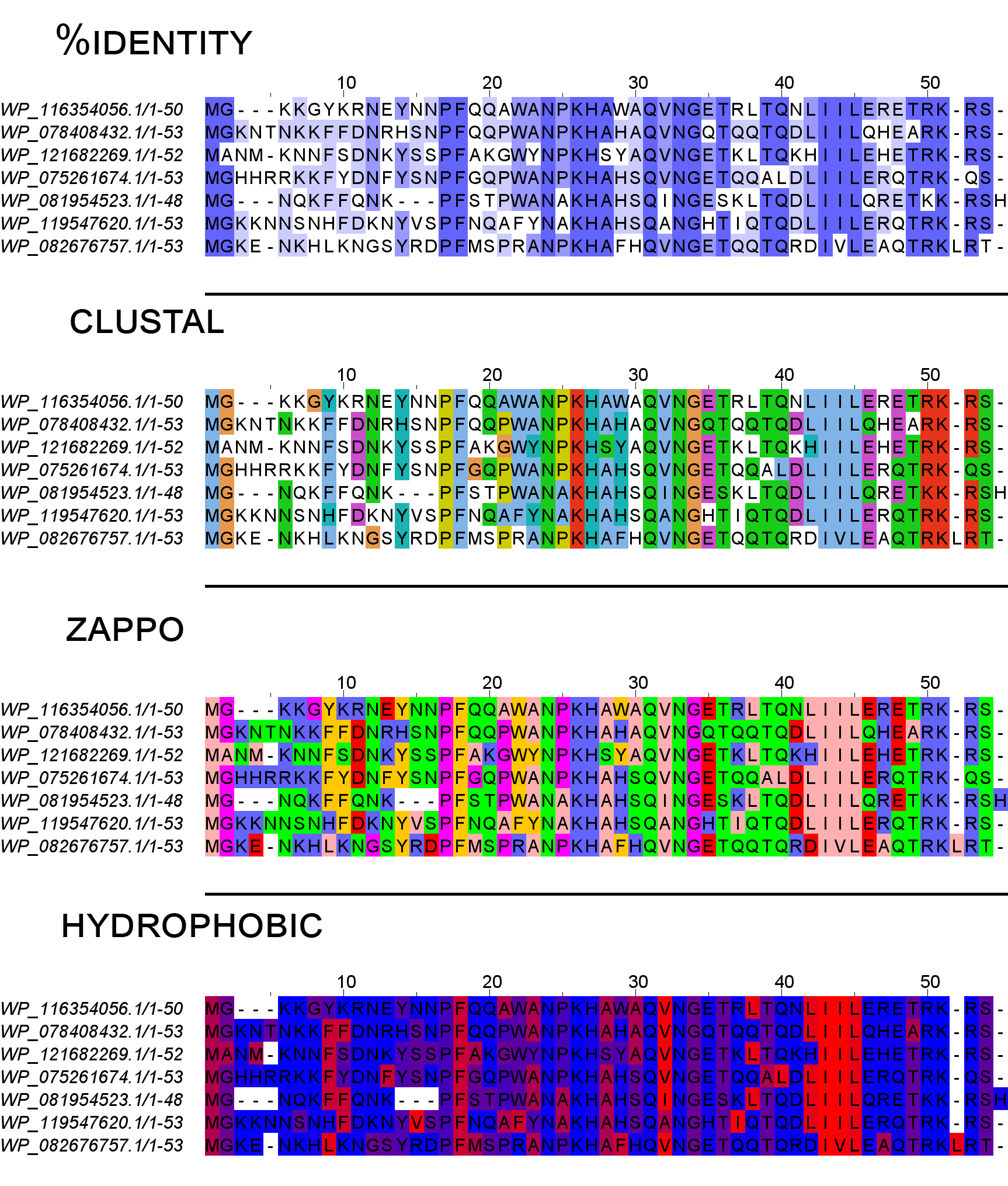 Демонстрация различный окрасок множественного выравнивания различных белков семейства YpzG, визуализация в Jalview, выравнивание ClustalWS.